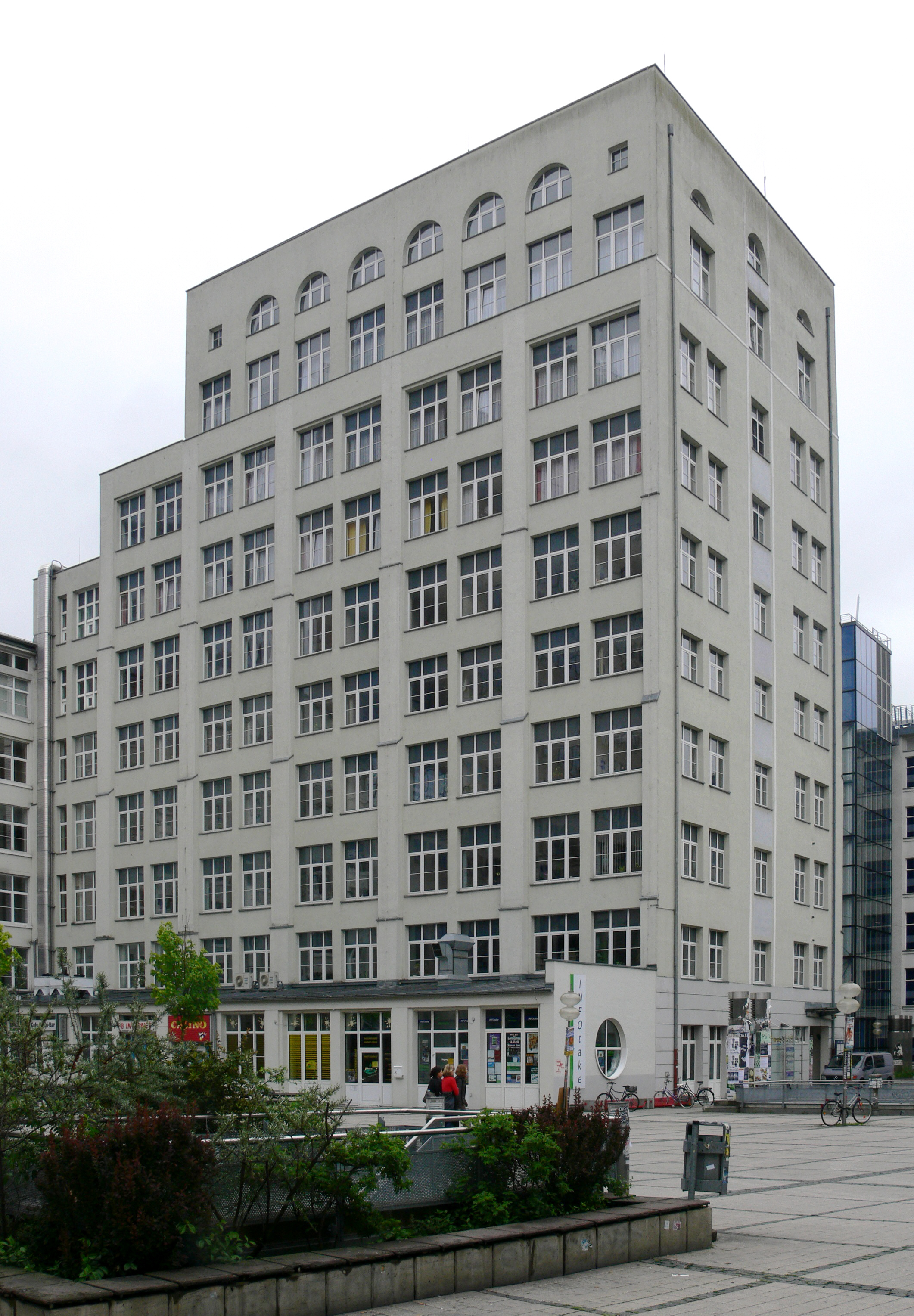 Jena: "Zeiss Bau 15" am Ernst-Abbe-Platz